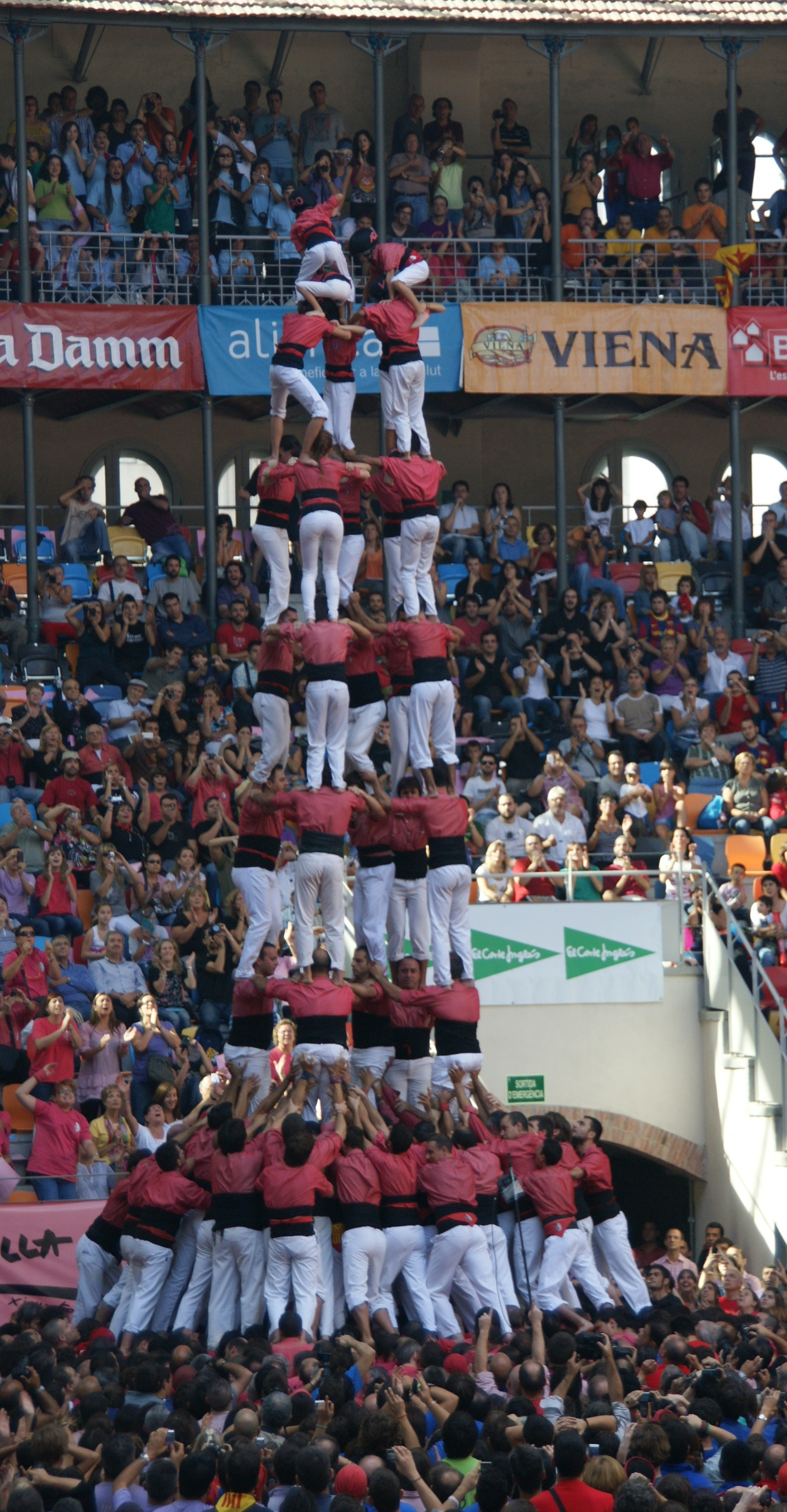 Colla Vella dels Xiquets de Valls, 5 de 9 amb folre carregat, Concurs de Tarragona de 2010